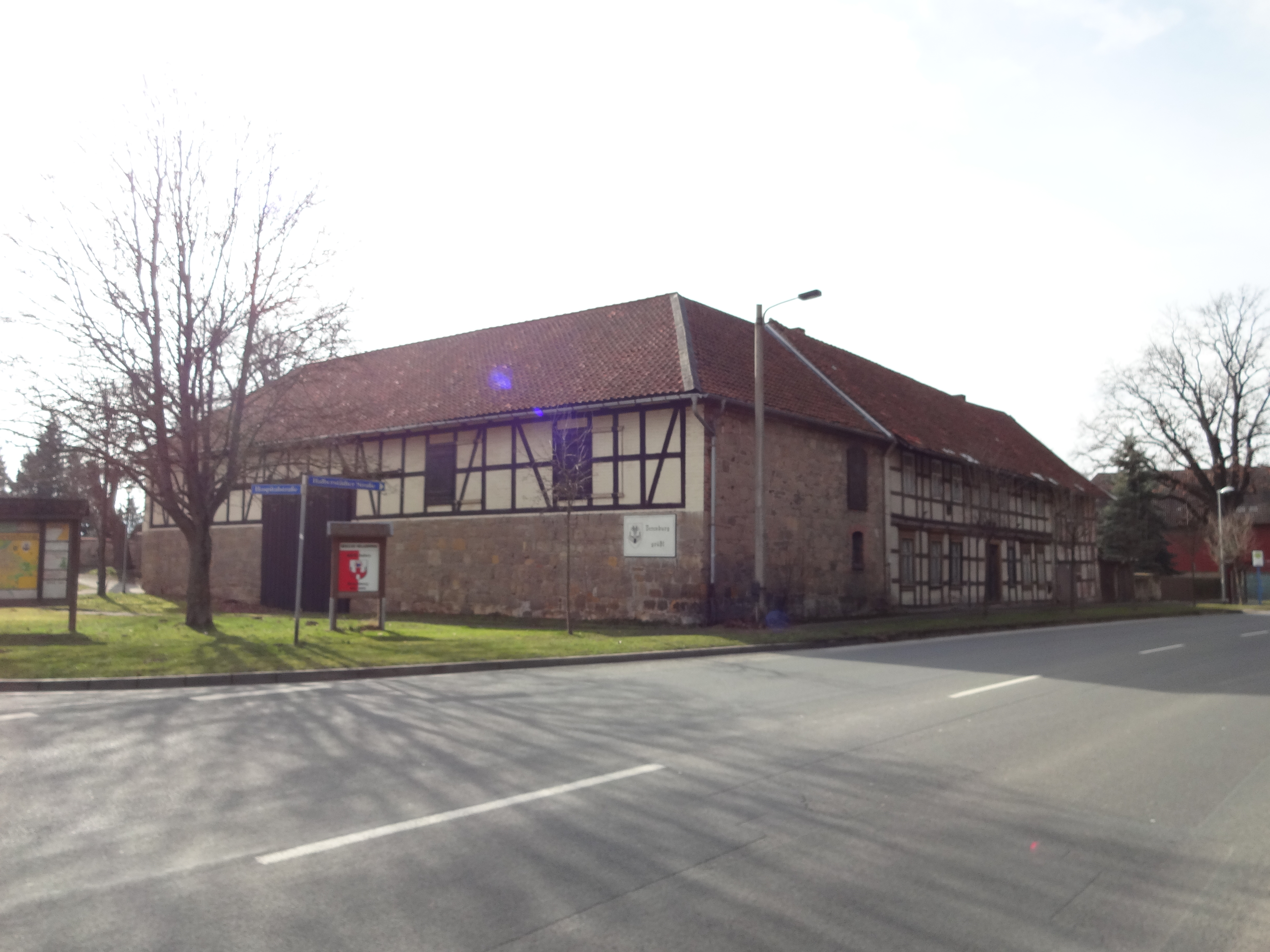 denkmalgeschütztes Fachwerkhaus in der Halberstädter Straße 56 in Derenburg, Ortsteil von Blankenburg (Harz)